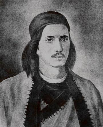 Портрет на Зико, син на българския чорбаджия Шишман, живял през 18 век в град Видин.